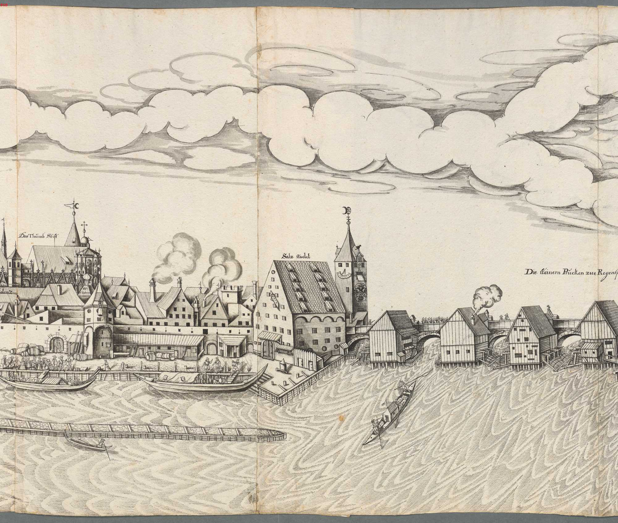 Abriß der Stadt Regensburg östlich und westlich der Steinernen Brücke. Beschriftungen: Das Thumb Stift (Dom Stift), St. Johann, Kranich (Tor), Salz Stadel (städtischer Salzstadel), Die stainern Prucken zu Regenspurg. Dom Salzstadel und Steinerne Brücke